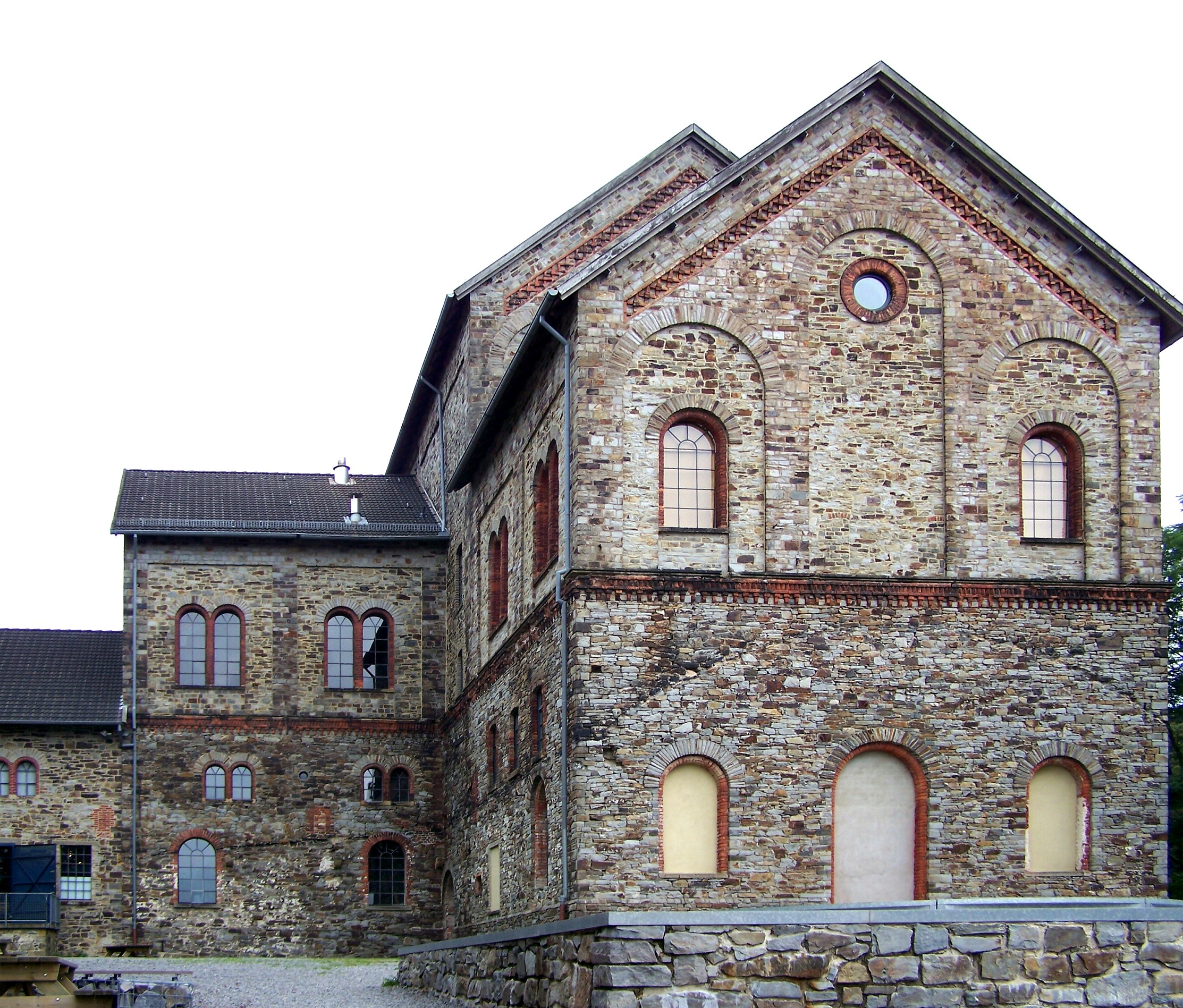 Haseschacht von Westen